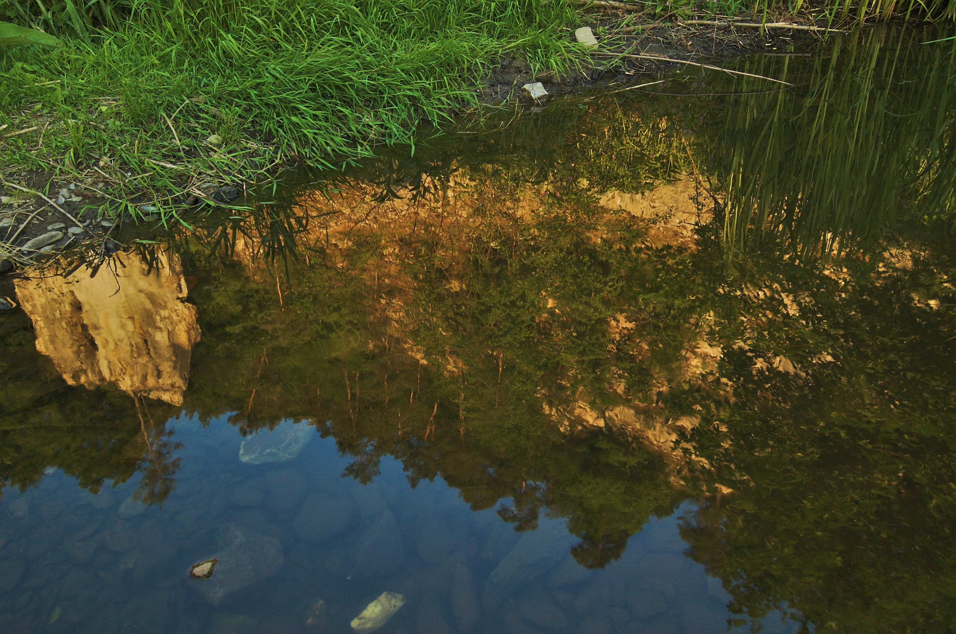 Odraz na hladině Sloupského potoka, přírodní rezervace Sloupško-Šošůvské jeskyně, okres Blansko